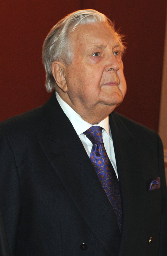 Народный художник СССР Илья Глазунов во время посещения Президентом России Владимиром Путиным Музея сословий России